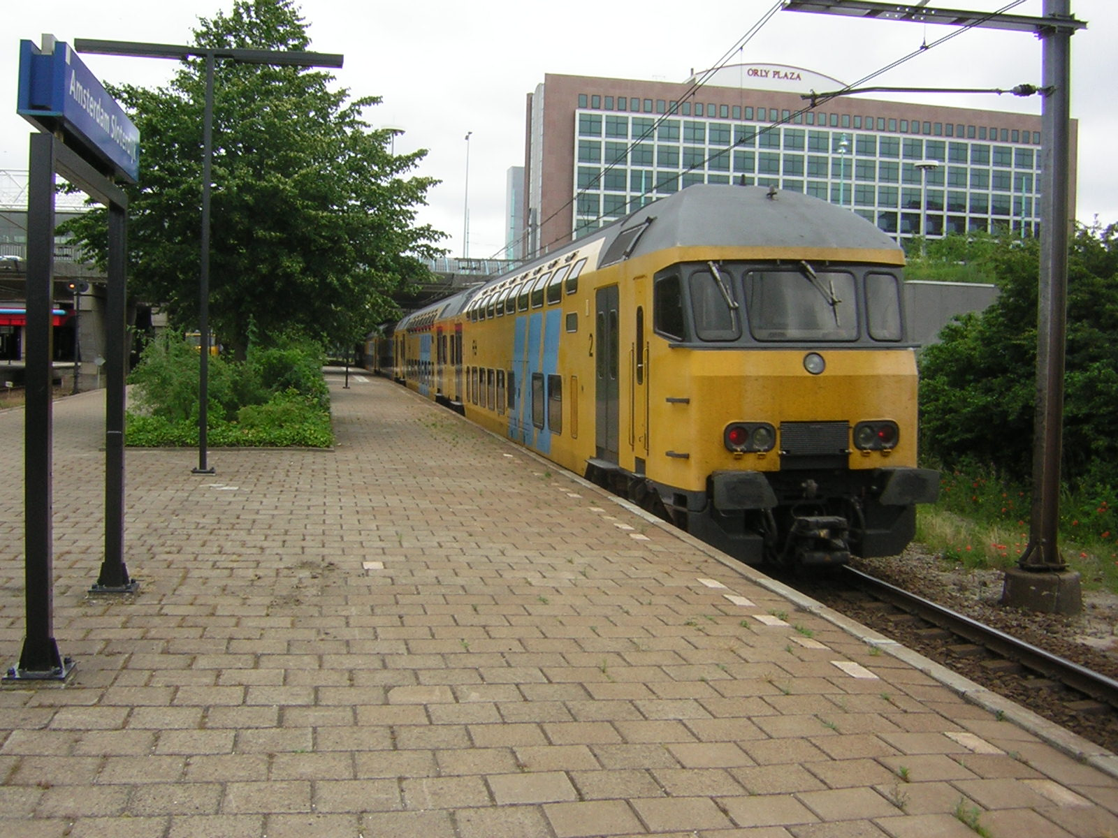 Een DD-AR te Amsterdam Sloterdijk. Juni 2003.